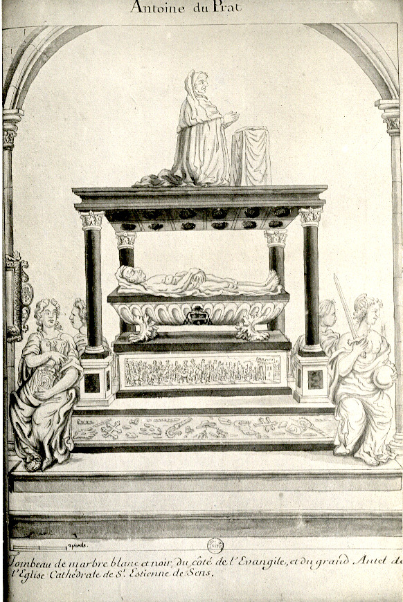 Tombeau du cardinal Duprat, cathédrale de Sens (Yonne)